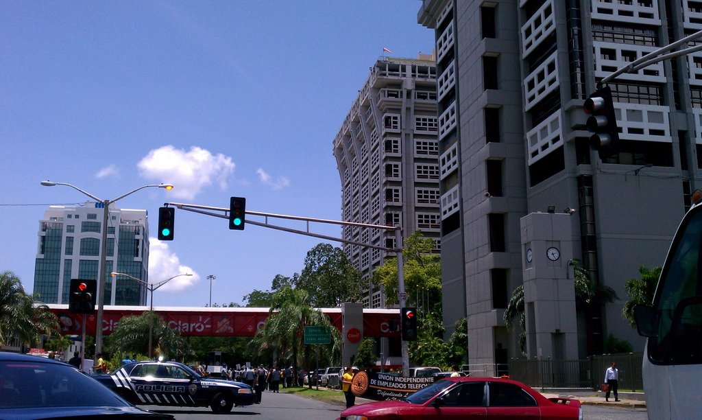 At Claro Plaza - Oficinas Centrales in Pueblo Viejo, PR.